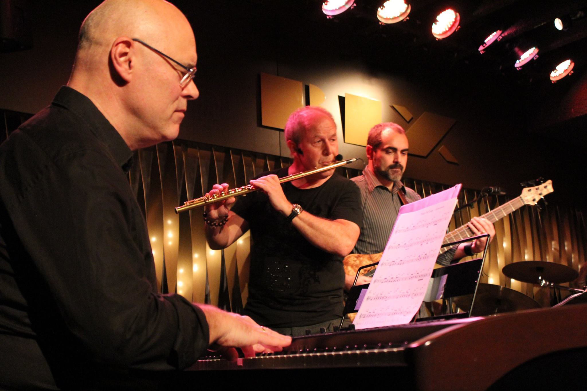 Lenny Mac Dowell Band